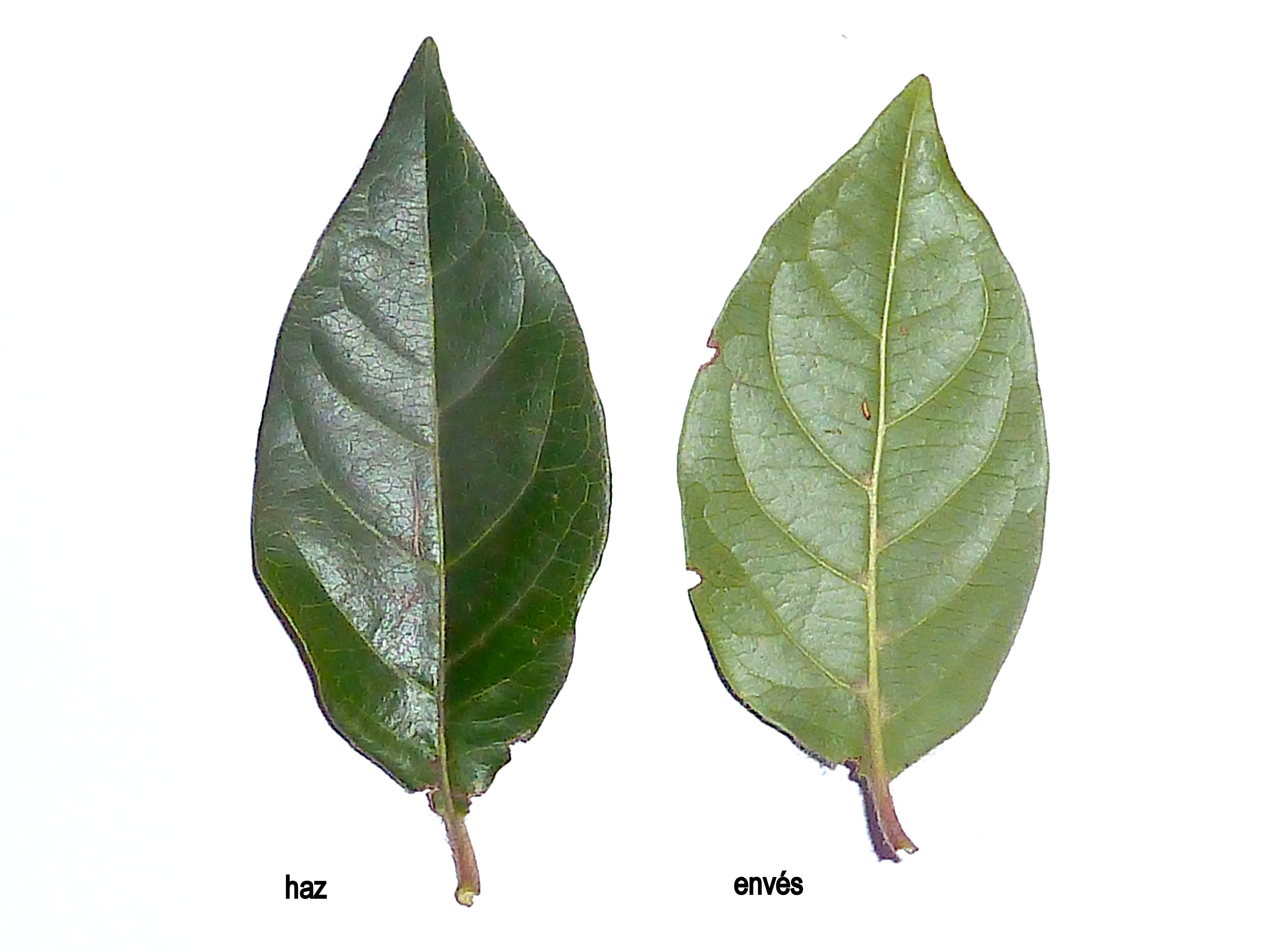 Viburnum tinus (Durillo) - Hojas, haz y envés - Ornamental/cultivado, Calle Goya, Madrid (España).